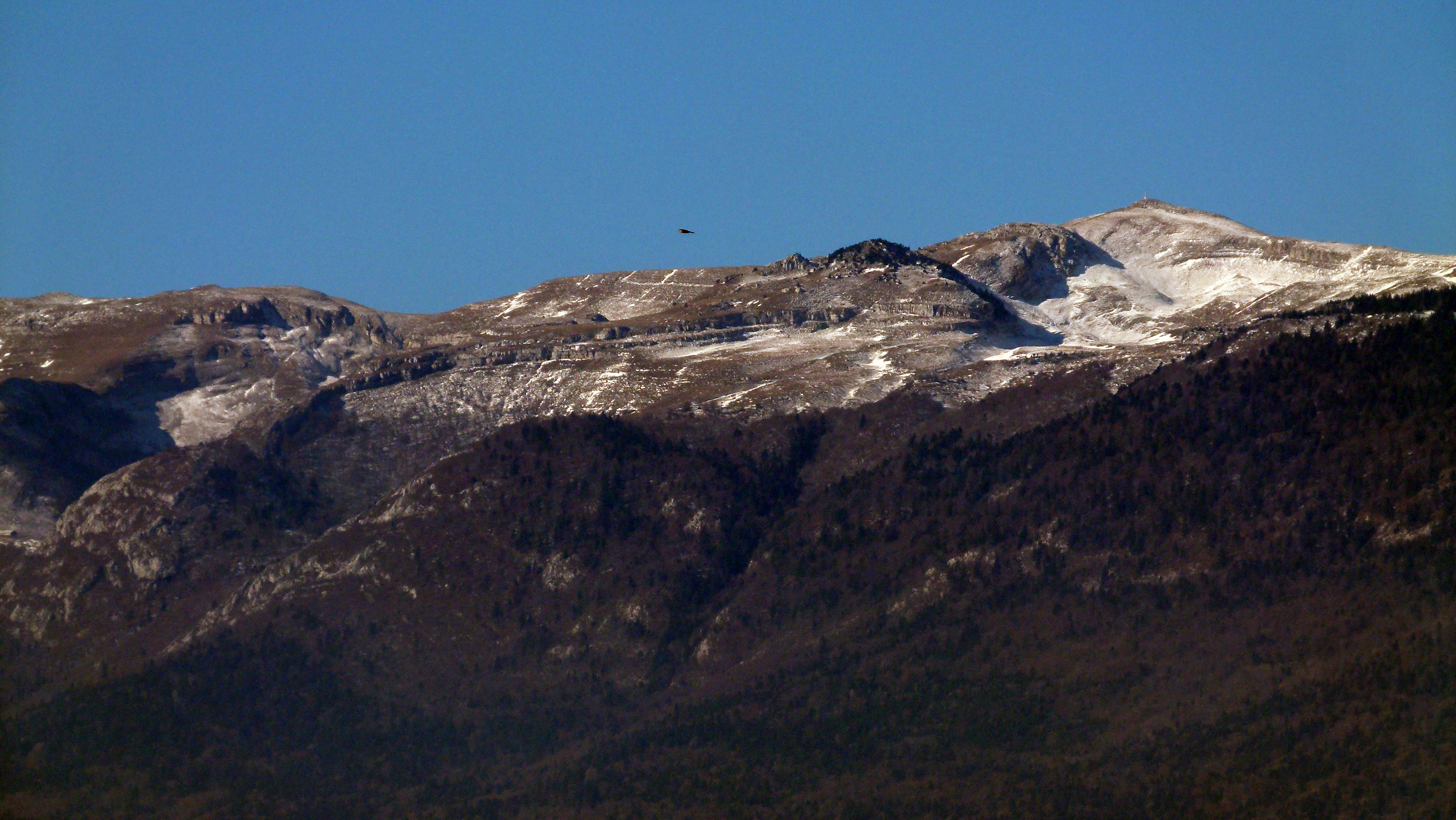 Le Reculet